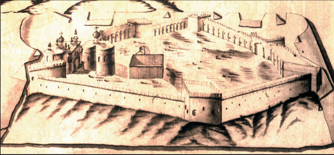 Рисунок Можайской крепости